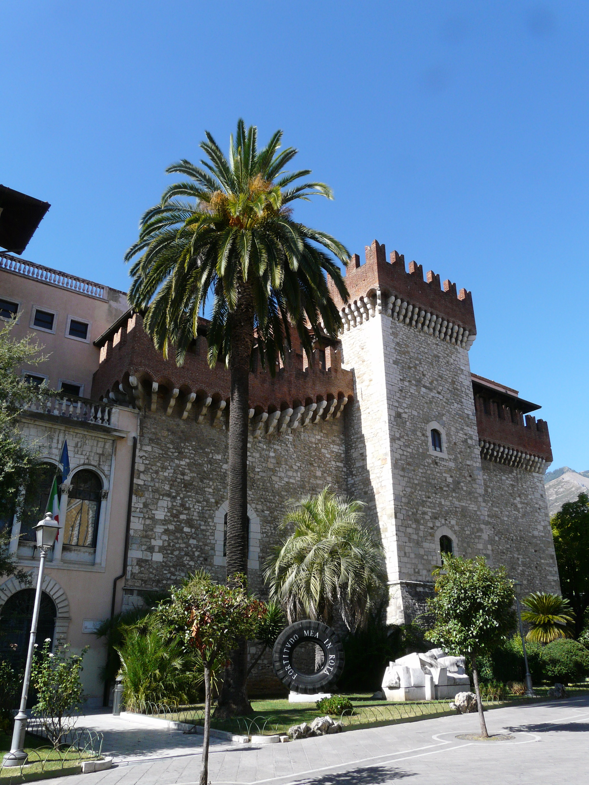 Palazzo Cybo Malaspina, Accademia delle Belle Arti di Carrara, Toscana, Italia